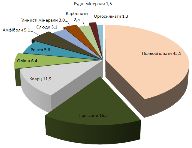 Поширеність мінералів в Земній корі. кругова діаграма пошереності мінералів у Земній корі (у обємних відсотках)